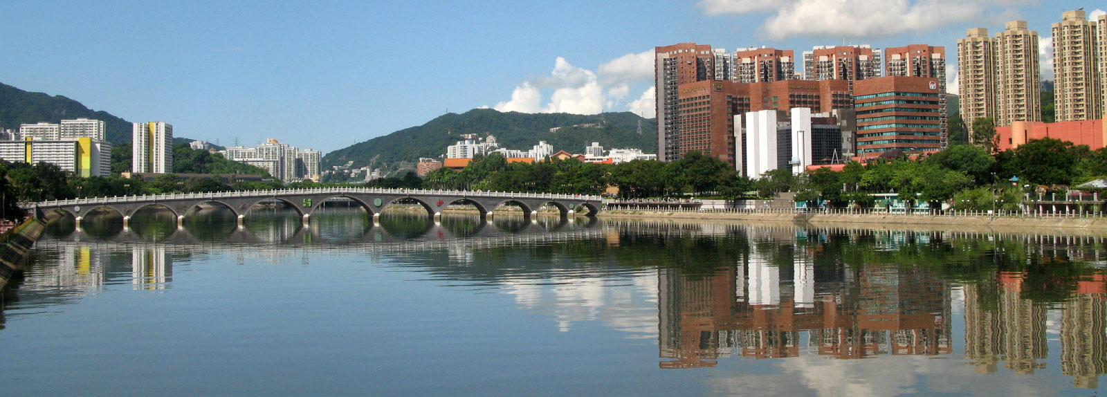 modified [1]